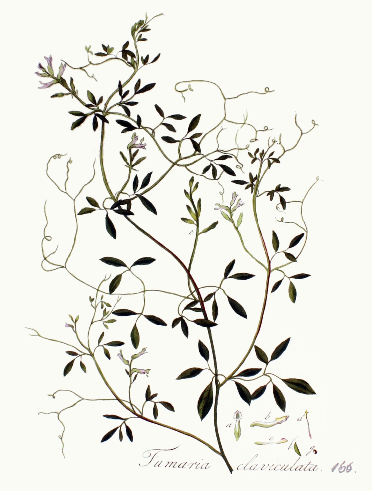 Ceratocapnos claviculata (L.) Lidén (Syn. Corydalis claviculata (L.) DC., Fumaria claviculata L.)